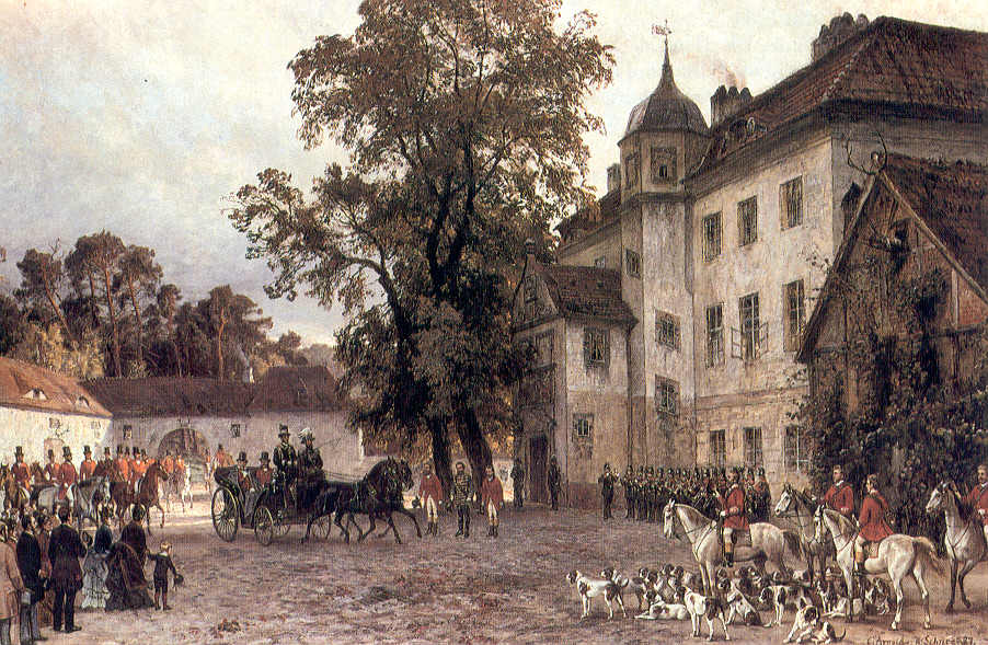 Das Ereignis fand vermutlich November 1886 statt. Das Bild spiegelt den Stilwandel vom Biedermeier zur wilhelminischen Epoche. Die Pinselführung steht im Widerspruch zur Detailschärfe ohne Porträtähnlichkeit. Nach dem einfallenden Licht, das nur noch den südwestlichen Hofteil beleuchtet, findet dasEreignis am späten Nachmittag statt. Der 89-jährige Kaiser sitzt im offenen Jagdwagen. Vor den beiden Kastanien begrüßt ihn der Jagdzeugmeister. Rechts vorne stehen die Piqueure mit Graf Salomon an der Spitze und der Meute. Zur Begrüßung des Kaisers bläst ein Musikcorps. Hermann Schnee hat das Schloss rechts mit drei anstatt zwei Fenstern gemalt. Die Kastanien sind entgegen der Jahreszeit belaubt. Die Zinkgußgruppe Wildschweinjagd von Wilhelm Wolff (1861) in der Mitte des Hofes ist weggelassen.